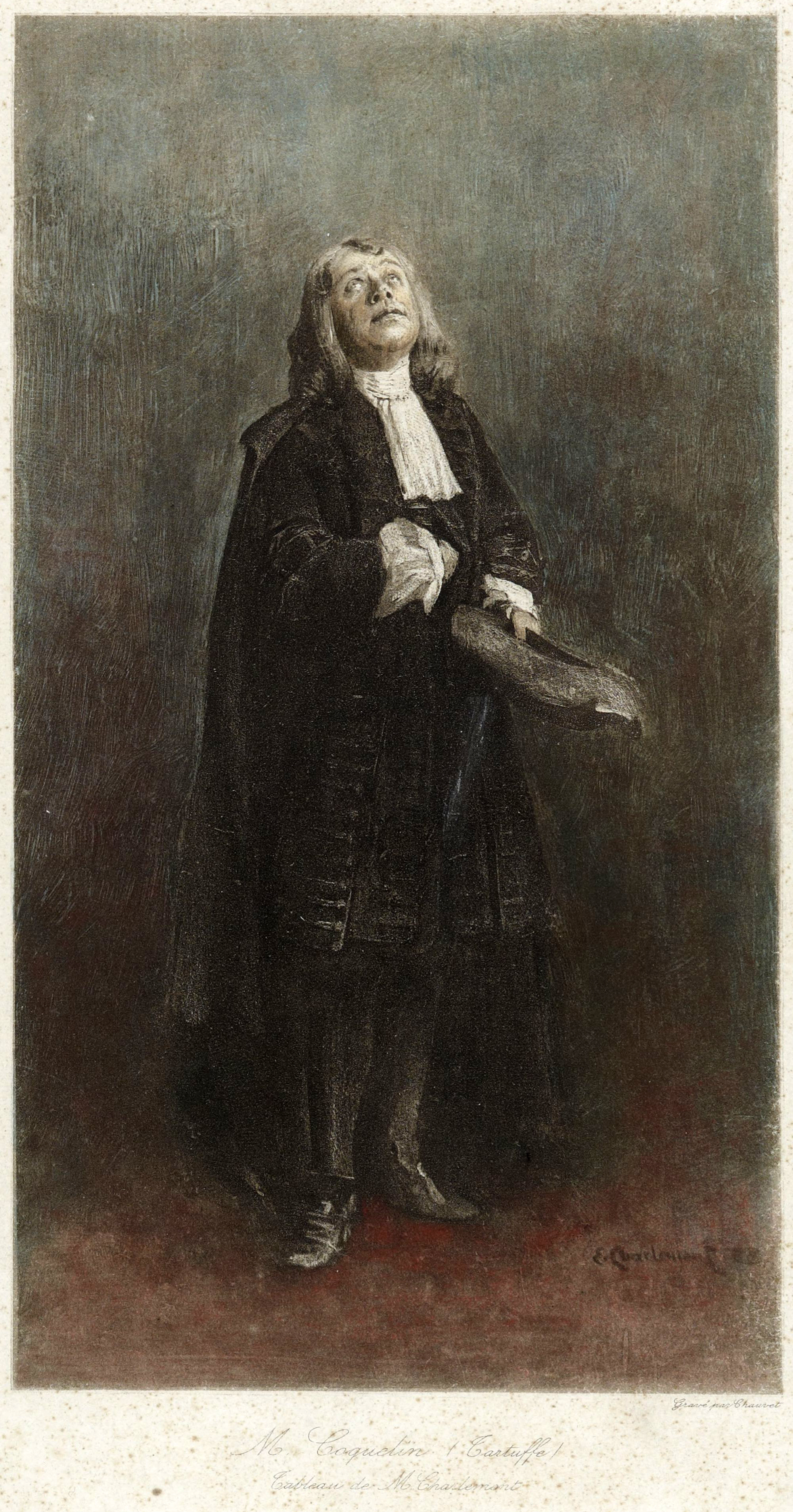 Gravure d'après un tableau de Charlemont.